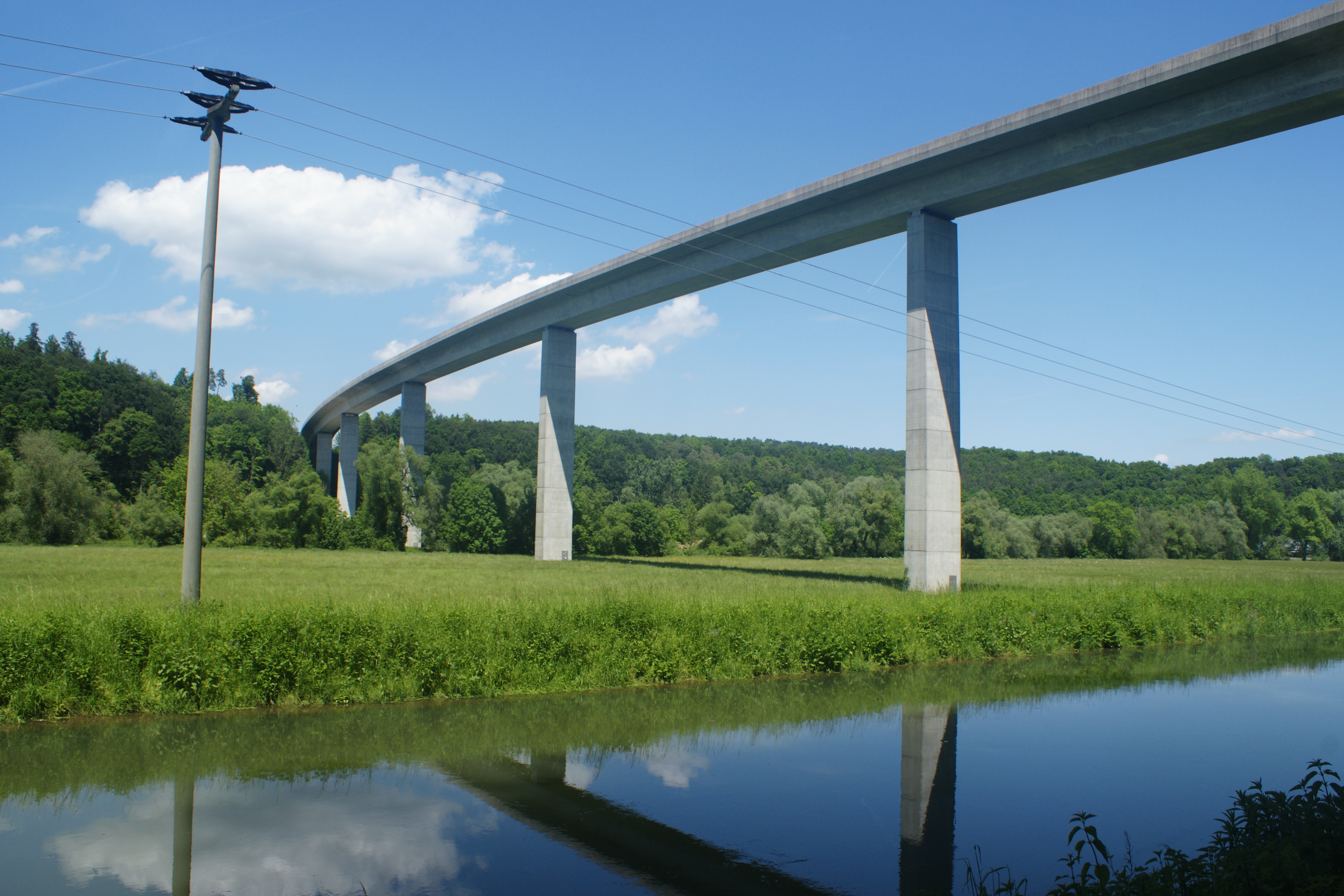 Neckartalviadukt B464 im Landschaftsschutzgebiet "Neckartal zwischen Tübingen und Plochingen" (Schutzgebiets-Nr. 4.15.010) (Abschnitt zwischen Altenburg und Kirchentellinsfurt)